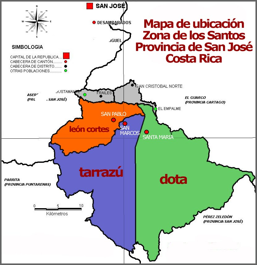 Maoa Zona de Los Santos, Costa Rica